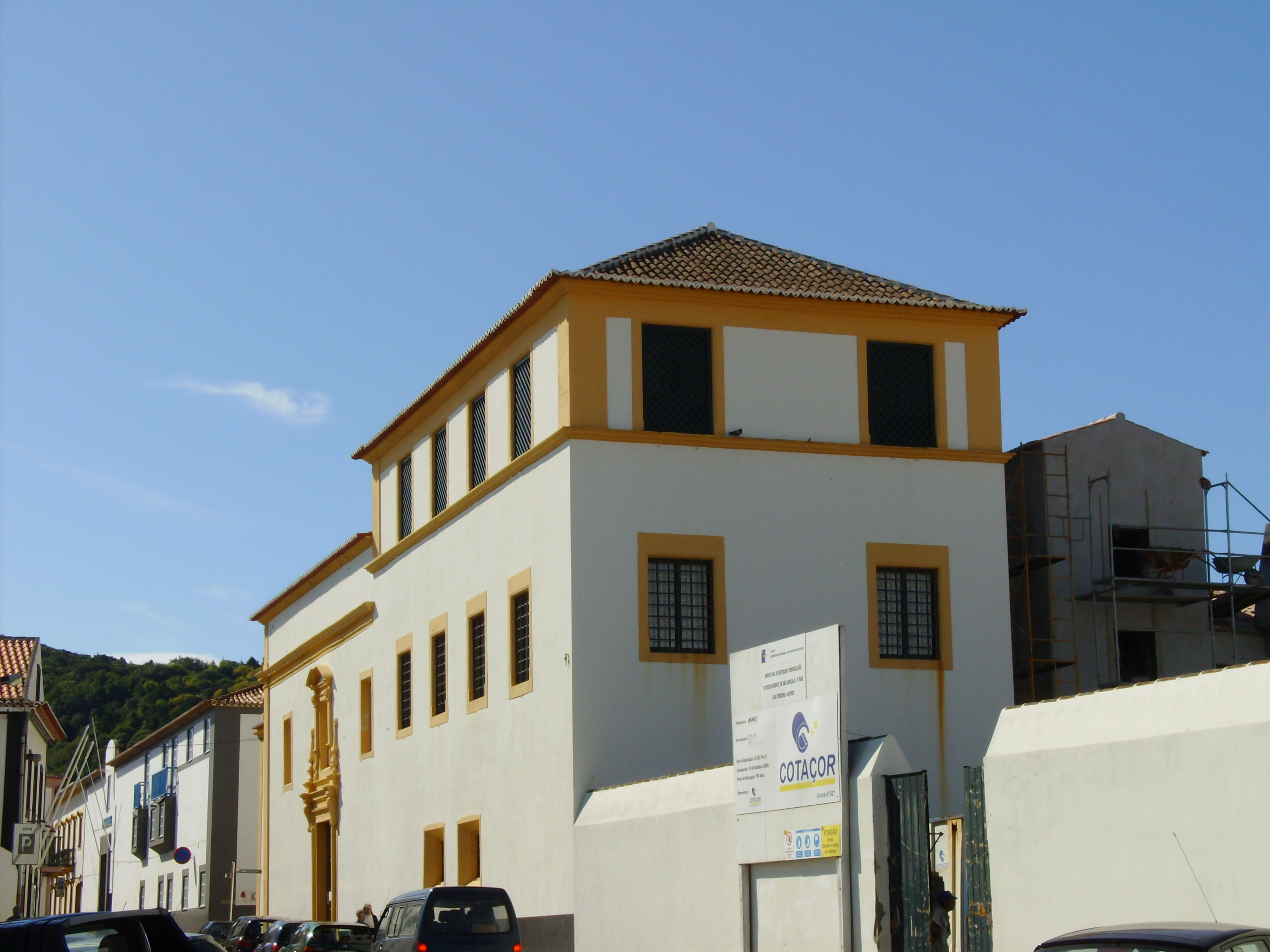 Convento de São Gonçalo, freguesia da Sé, cidade e concelho de Angra do Heroísmo, ilha Terceira, Açores: Igreja de São Gonçalo.